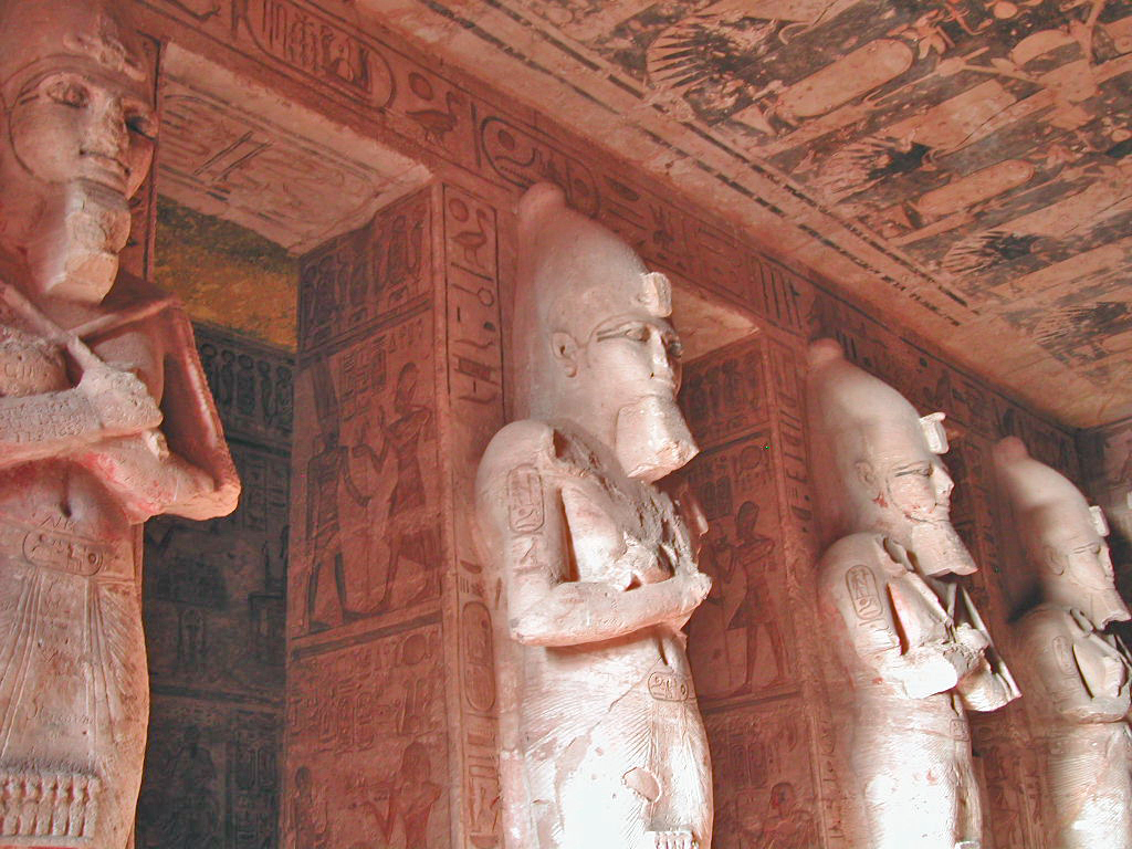 Statuen am Tempel vum Ramses II